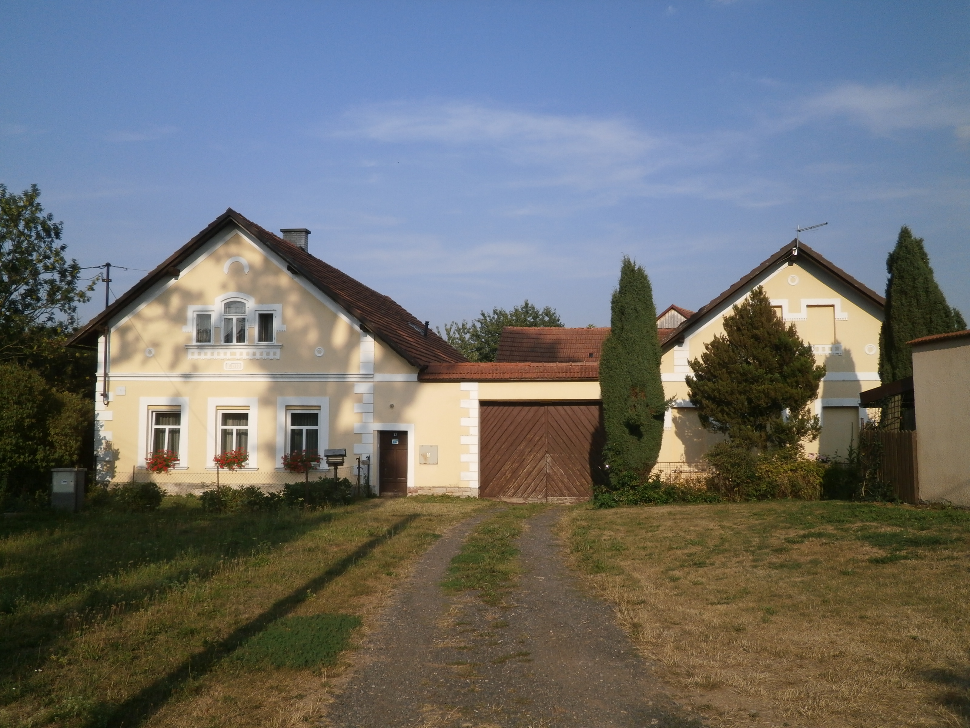 Mokrá Lhota - č.p. 22